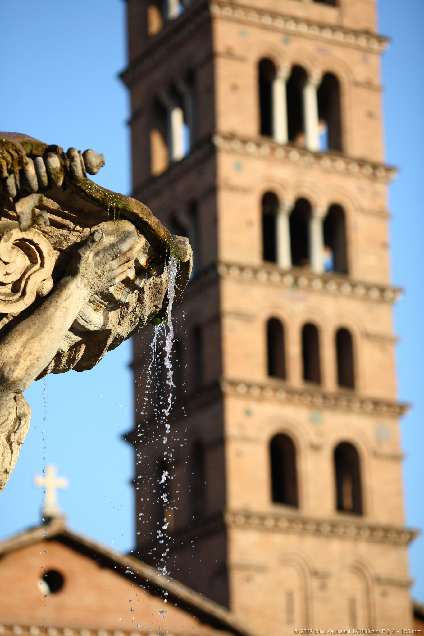 Link alla voce di Wikipedia. Foto di prova, scattata dal piazzale antistante Canon 5D + 135L 1/1000s f/2.8 100iso